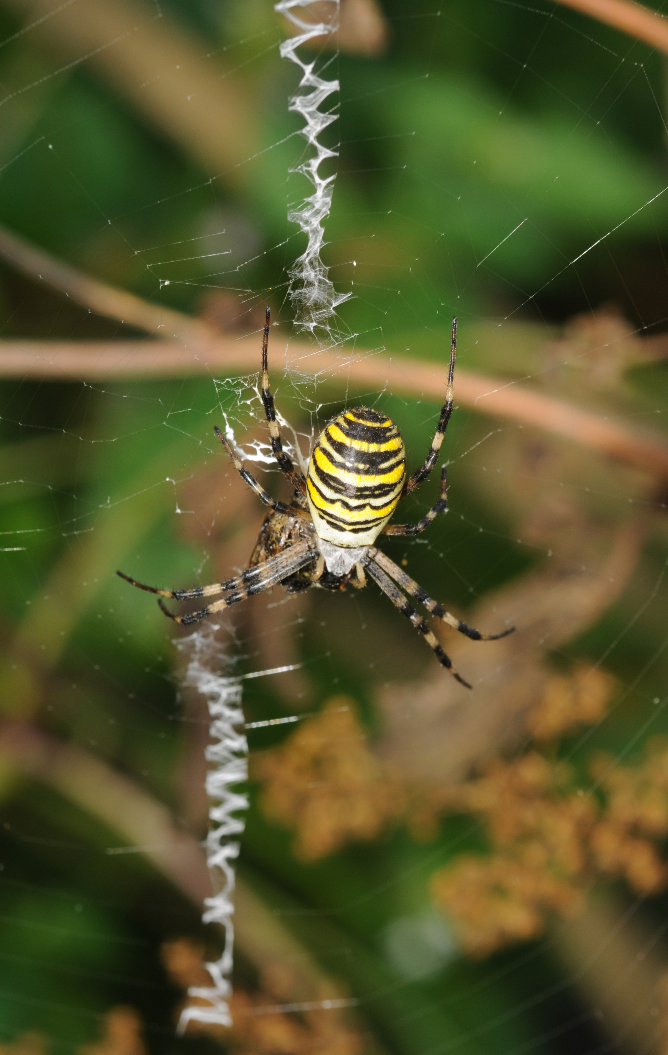 Argiope frelon, argiope rayée, argiope fasciée, épeire fasciée.